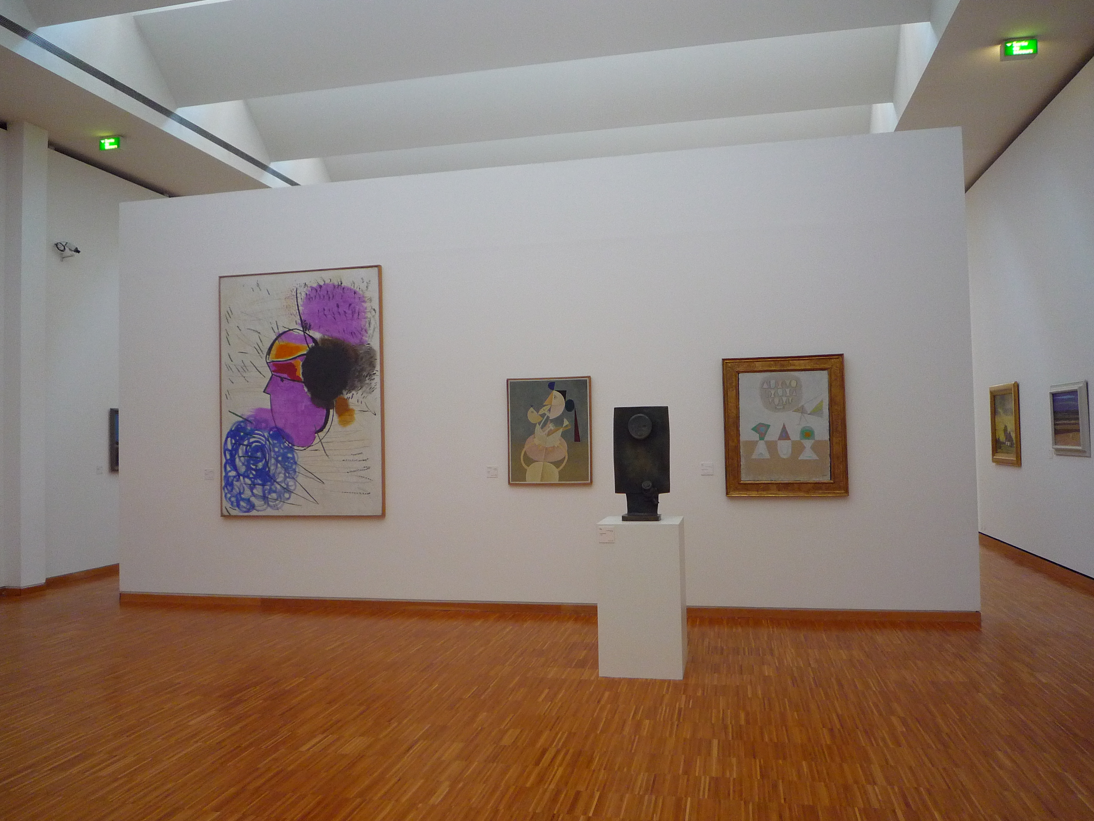 une des salles du XXe siècle - Musée de Grenoble